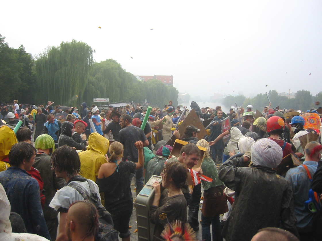 photo by Benutzer:Nicor